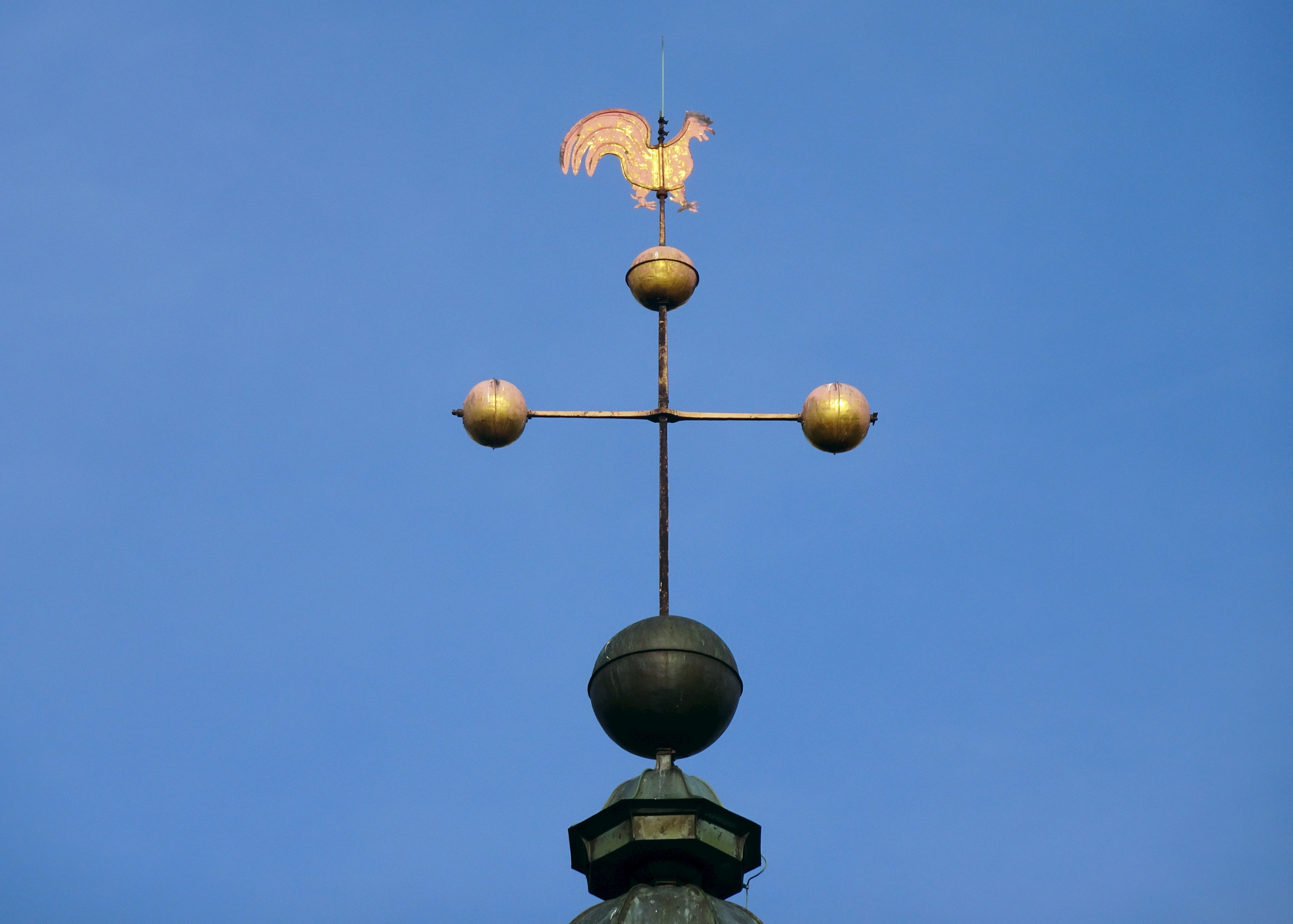 Östra Ryds kyrka, tuppen